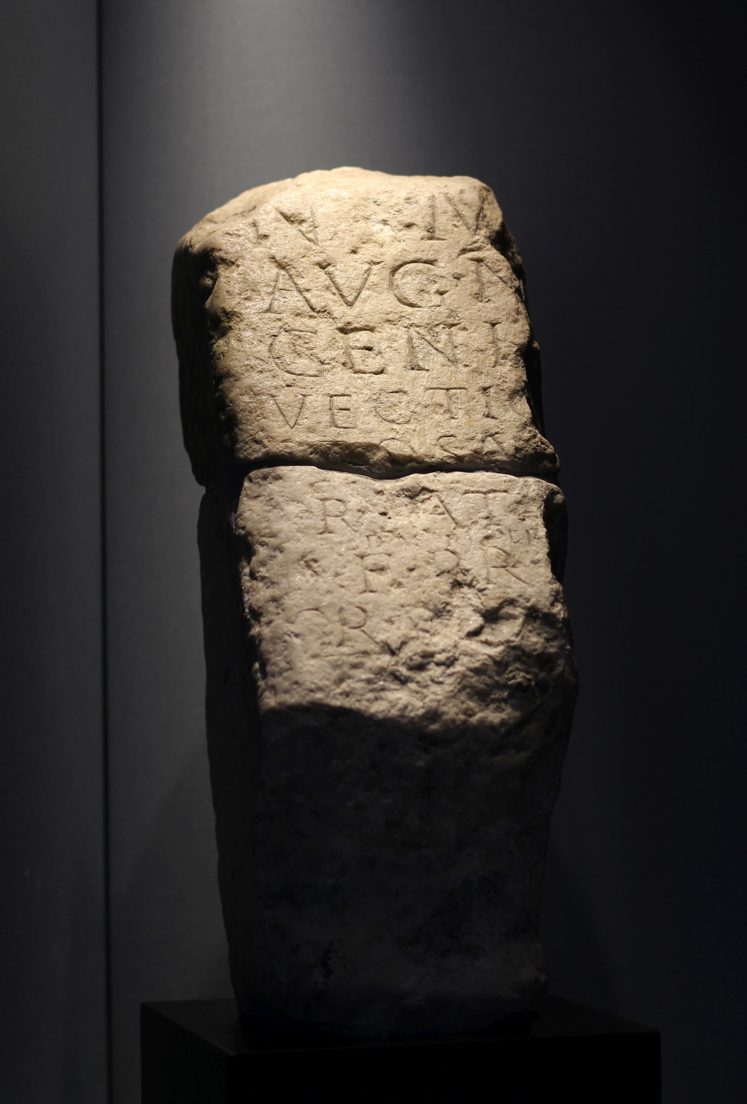 Weihestein von Montelbon Museum Nr. 6794